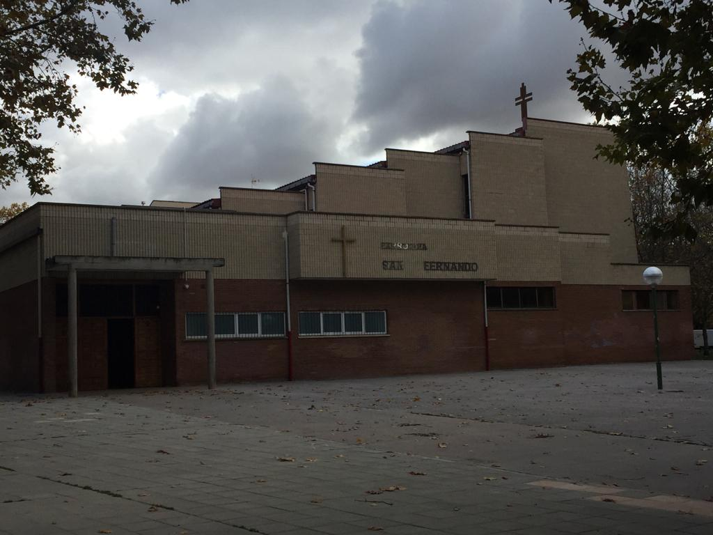 Iglesia de San Fernando Rey en Burgos.